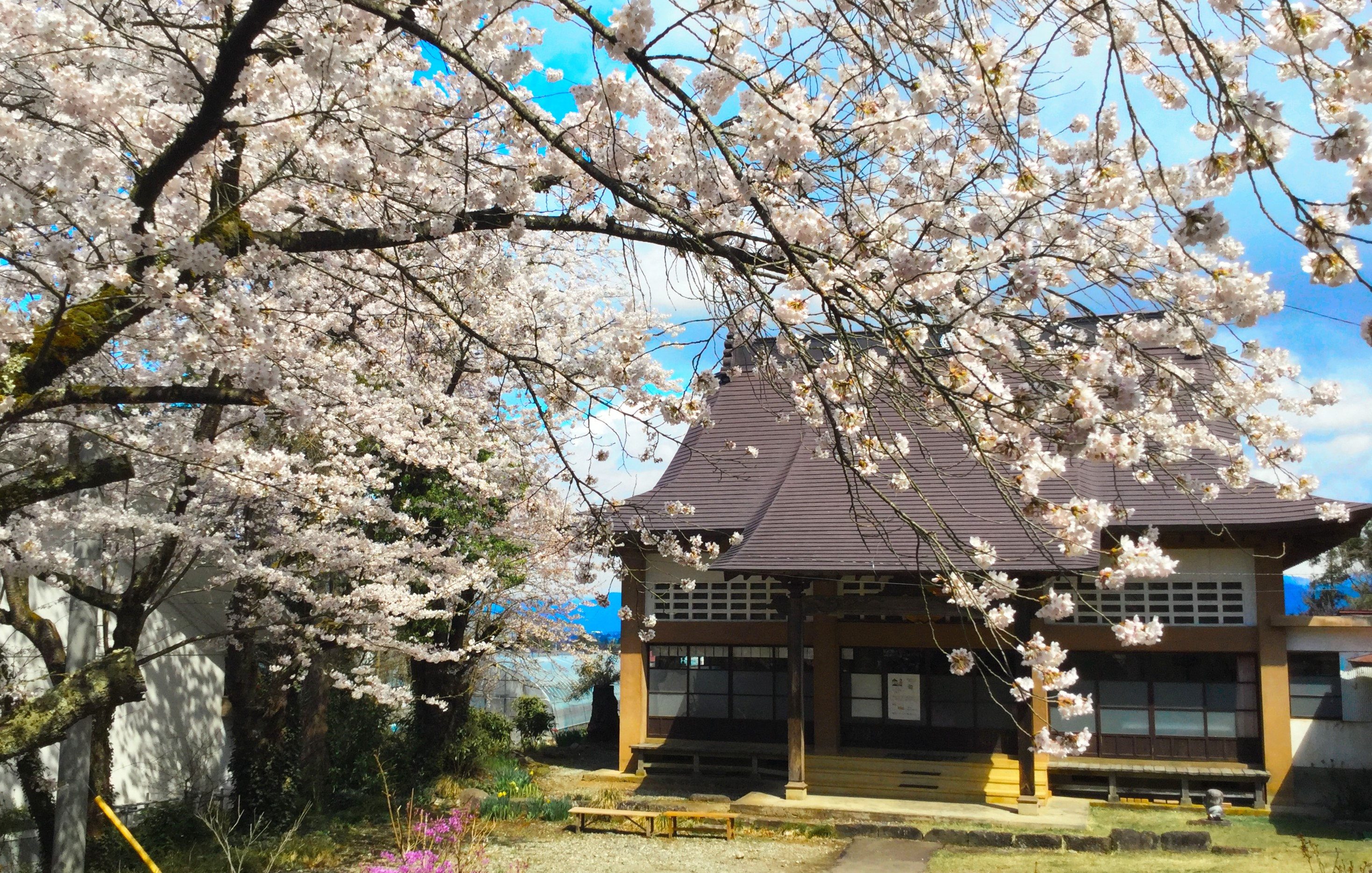 桜